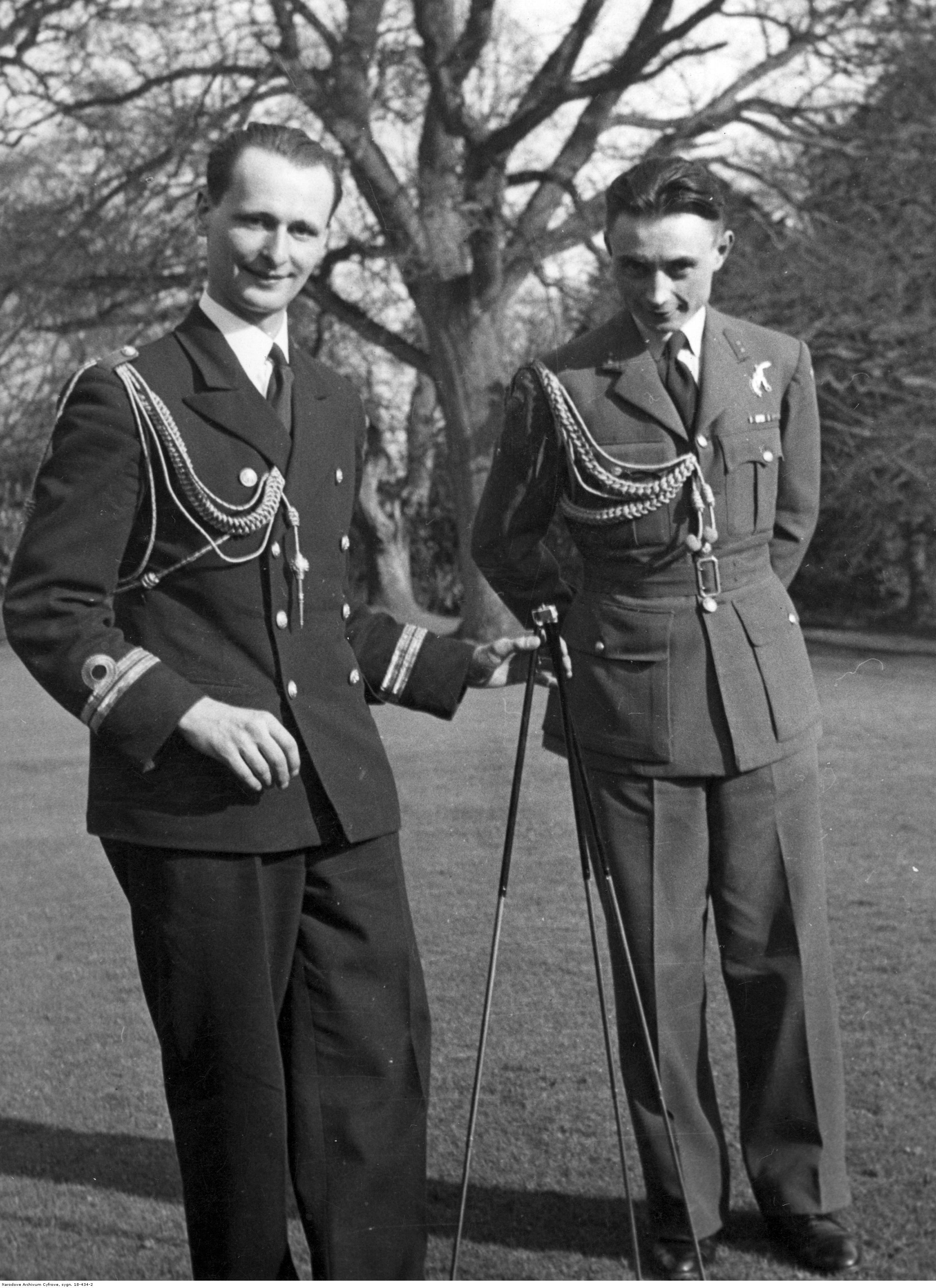 Adiutanci gen. Władysława Sikorskiego por. marynarki Józef Ponikiewski (z lewej) i por. pilot Czesław Główczyński. Archiwum Fotograficzne Czesława Datki. Sygnatura: 18-434-2